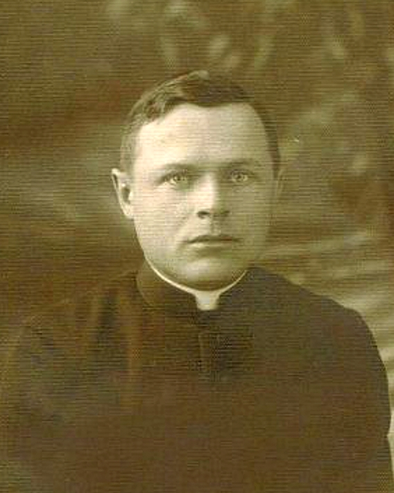 Ks. Stanisław Kołodziej (ur. 1907, Bączal Górny, zm. 1942, KL Dachau) - Sługa Boży Kościoła katolickiego, męczennik